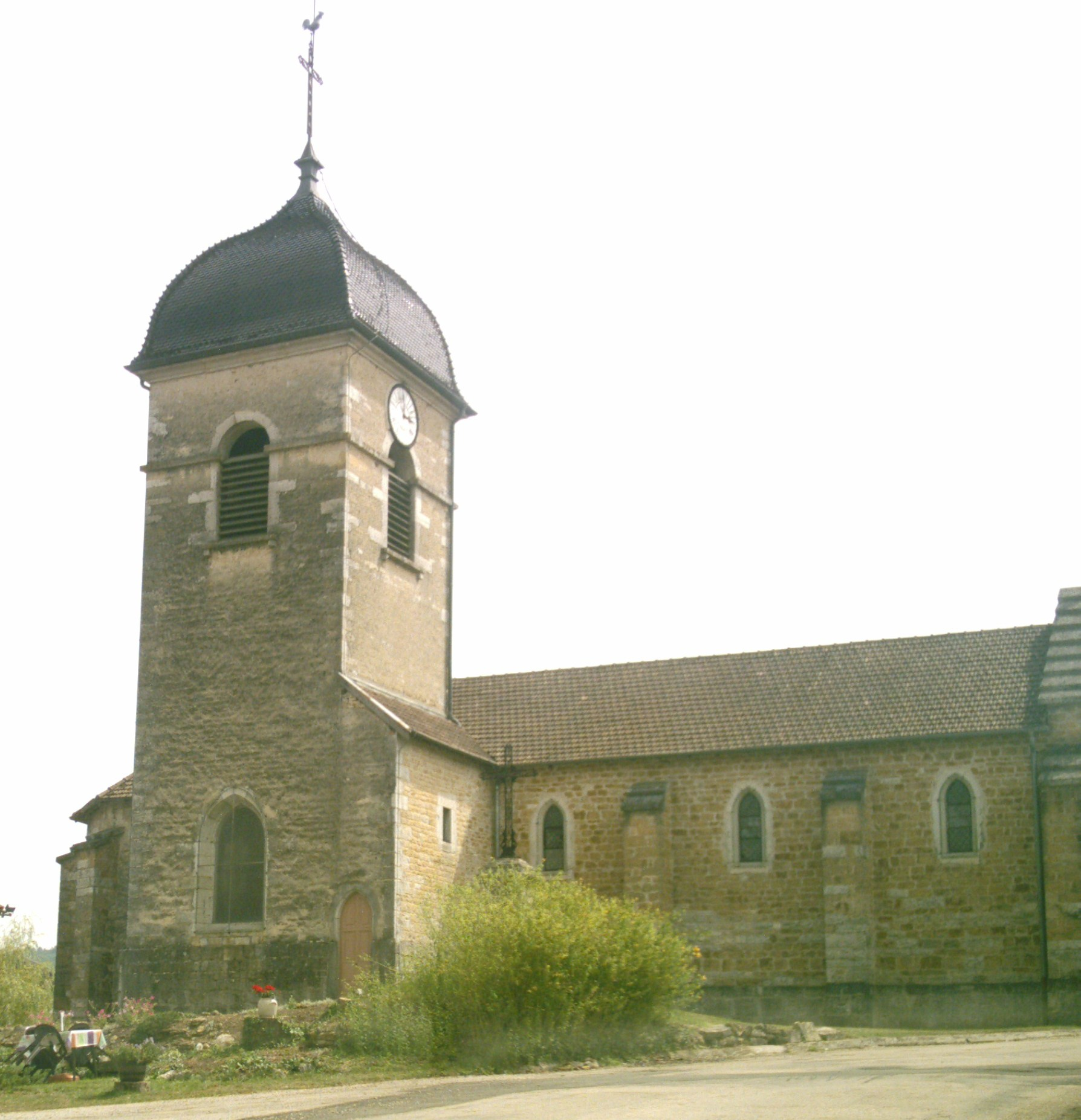 L'église de Bohas (Ain, FRANCE)